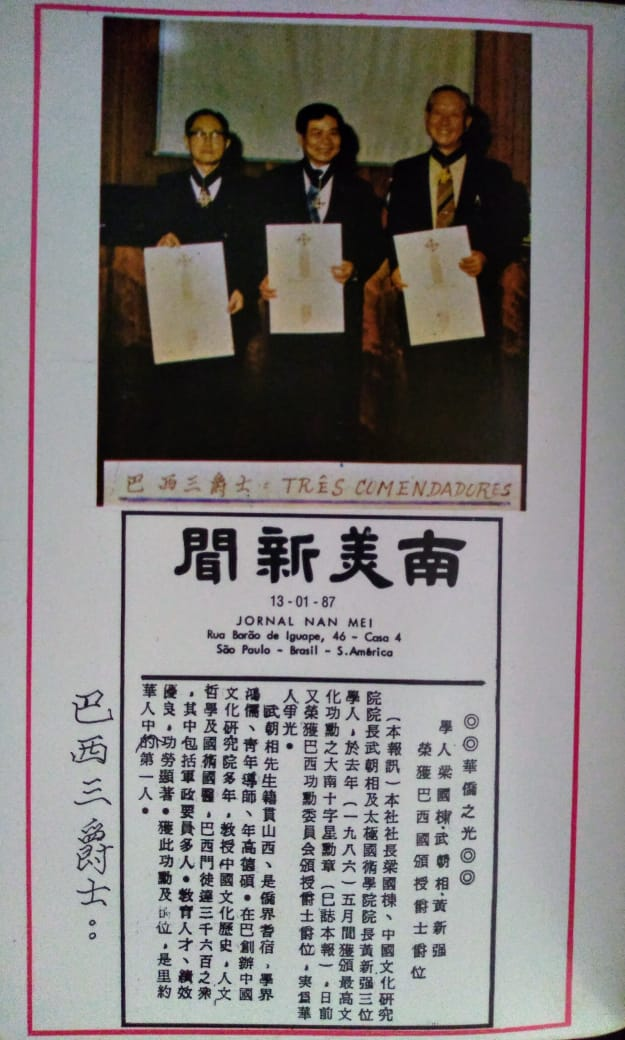 The picture with master Wu Chaoxiang when he becoming a Cultural Ambassador of the Chinese people in Brazil and news about that in the newspaper Nan Mei (01/13/1987).